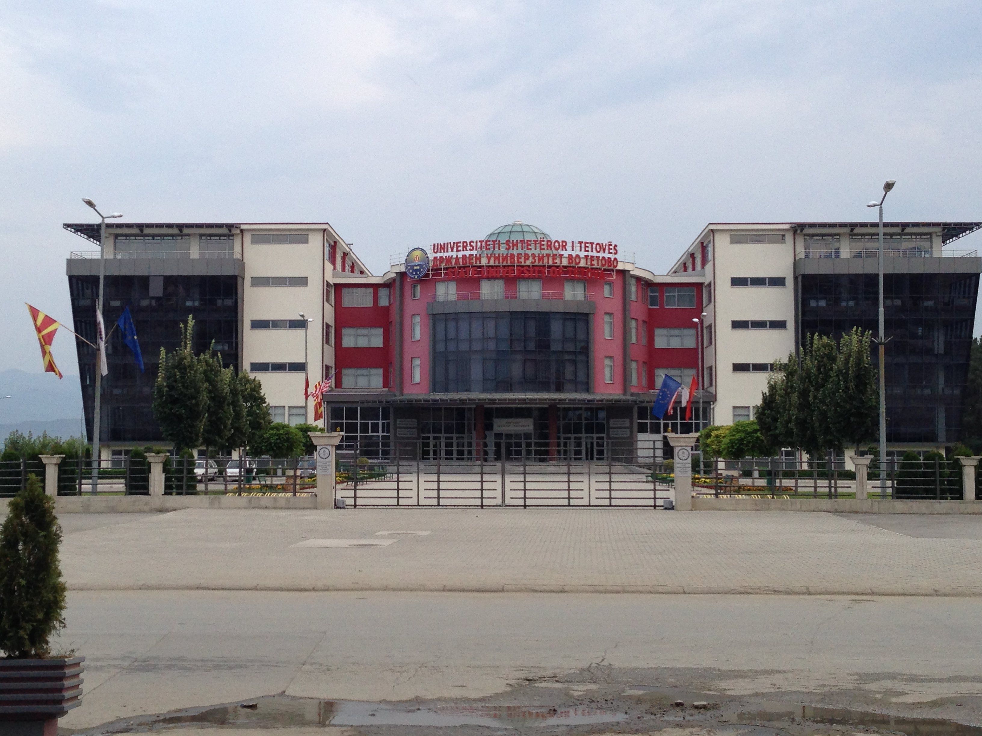 Universiteti Shteteror i Tetoves